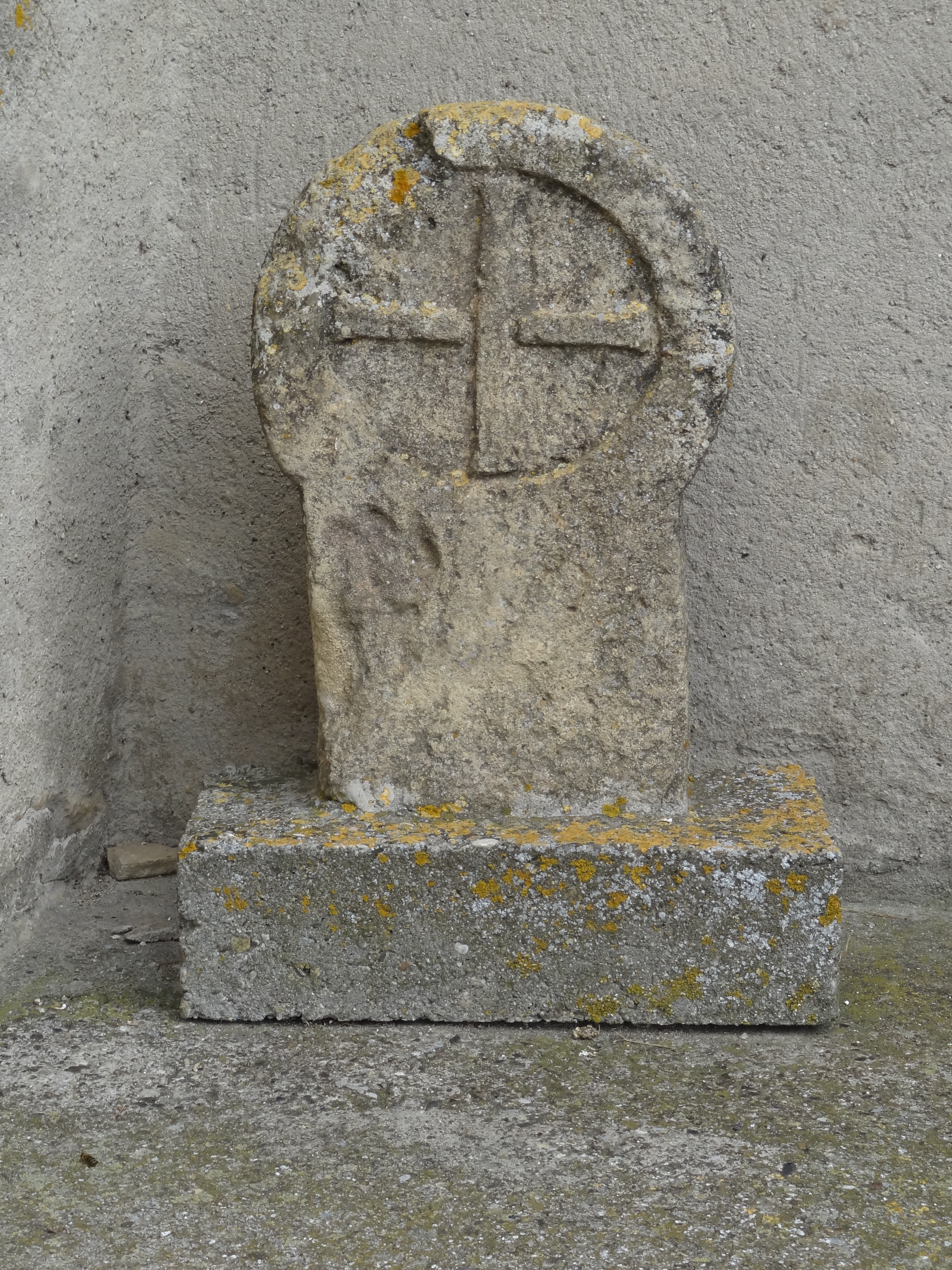 Croix de Cimetière d'Airoux .